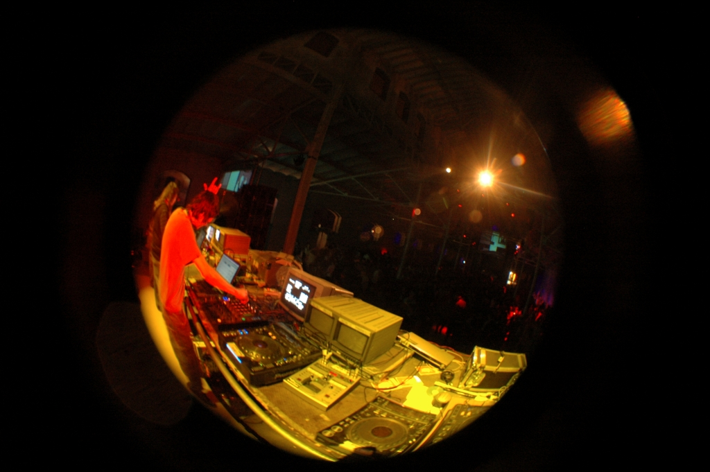 Vj live set (Delacrew)